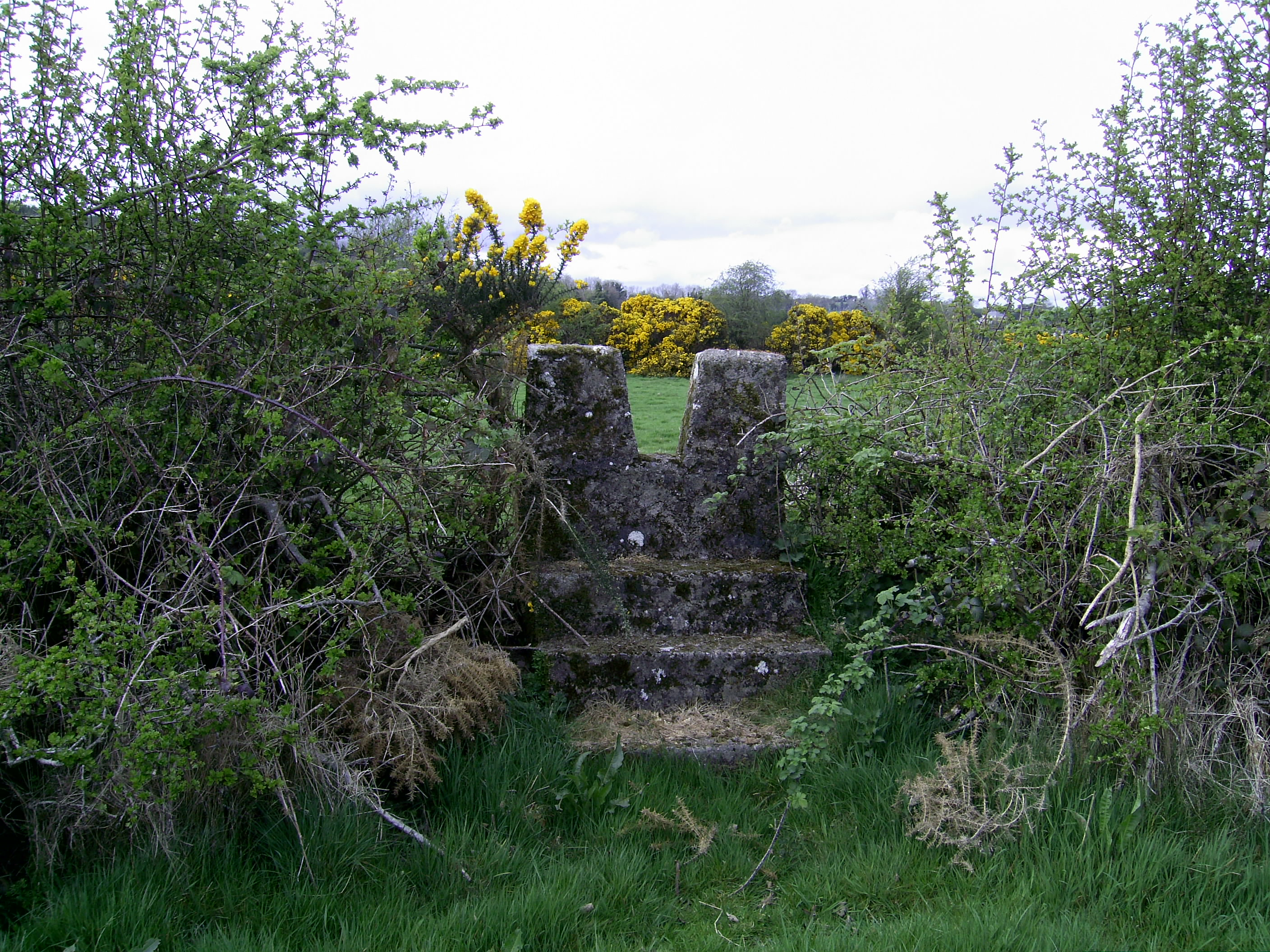 Stile du chemin de la messe, du champ, Ranaghan